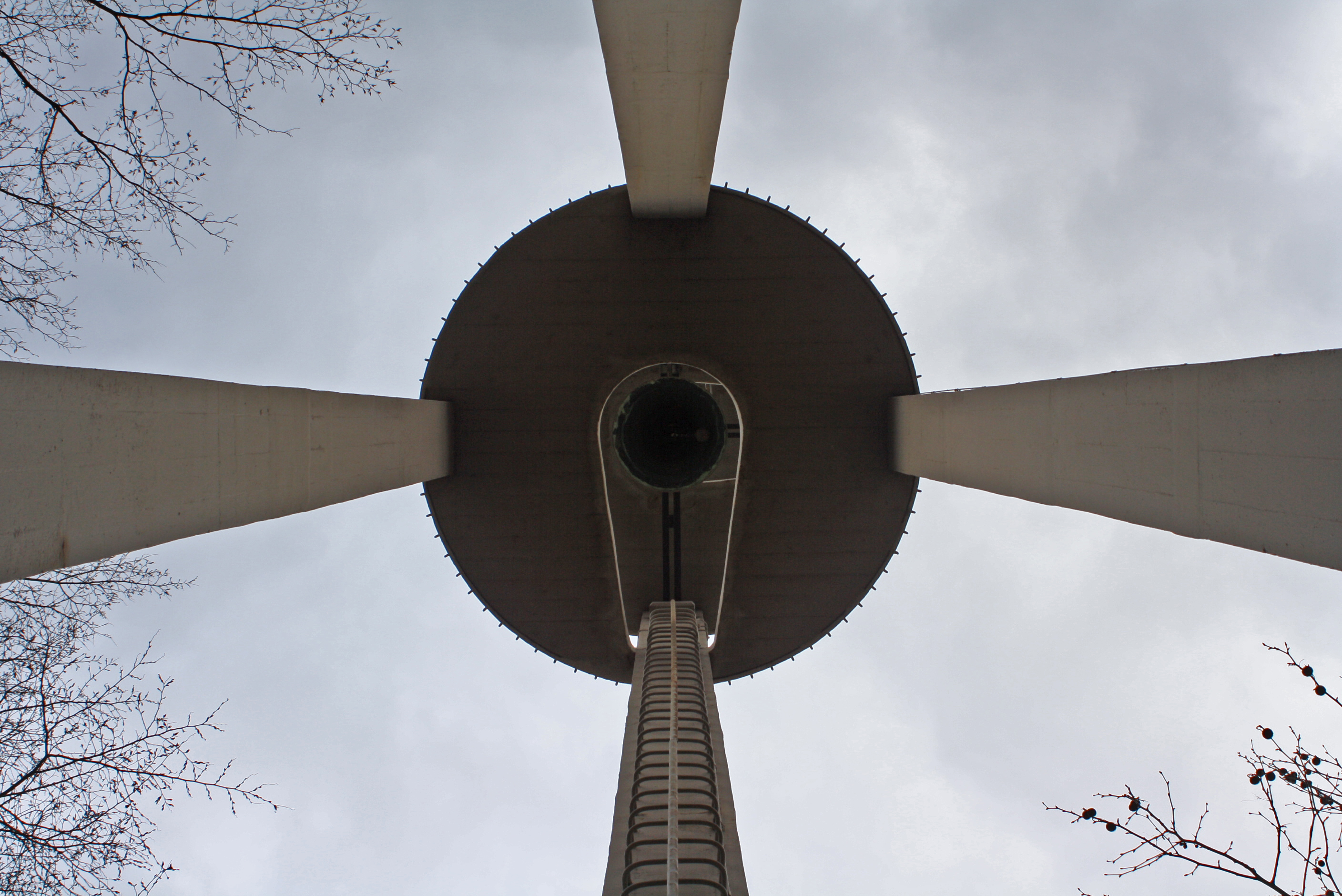 Pfarrkirche St. Joseph, Braunstr. 29–35, GlockenturmThis is a photograph of an architectural monument.